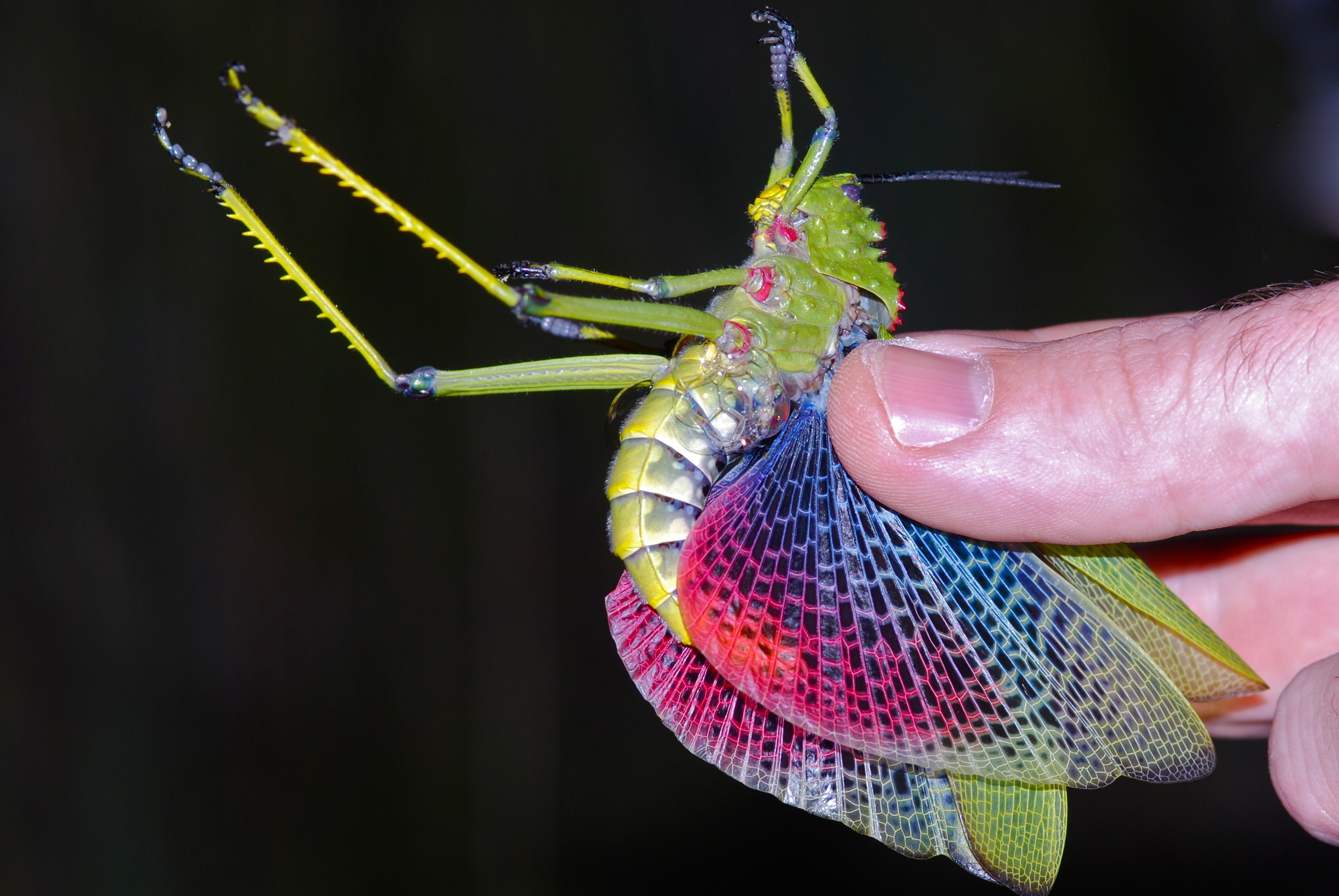 Manyane Resort Walking Trail, Pilanesberg, SOUTH AFRICA